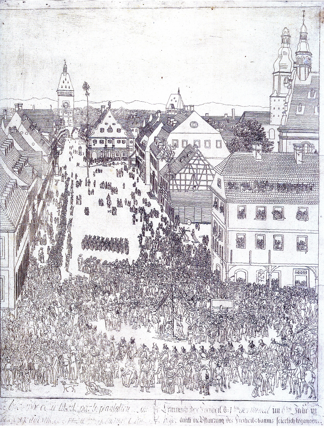 Errichtung des Freiheitsbaums in Speyer